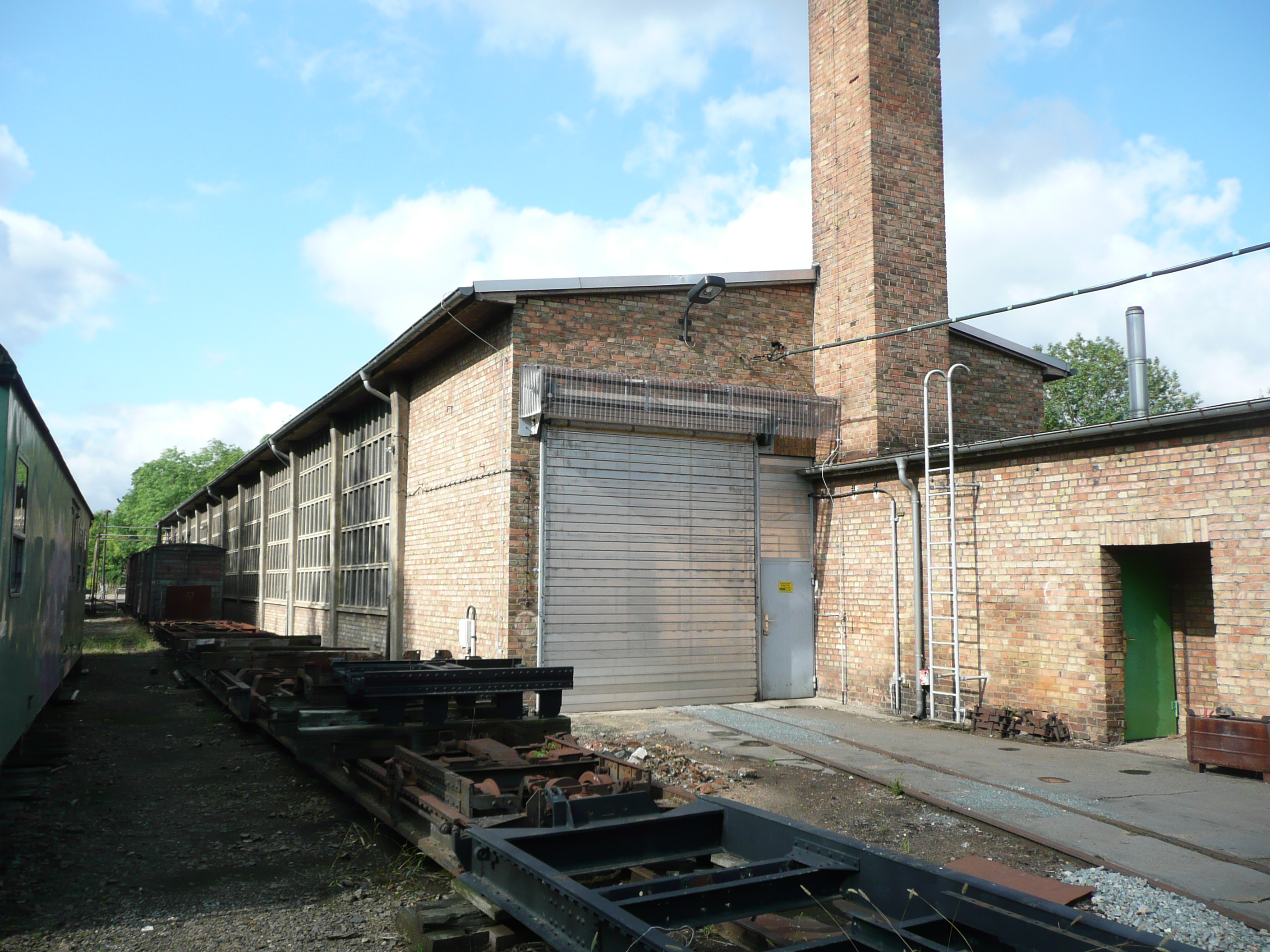 ehemalige WAS des Bahnhof Freital-Potschappel Hinteransicht